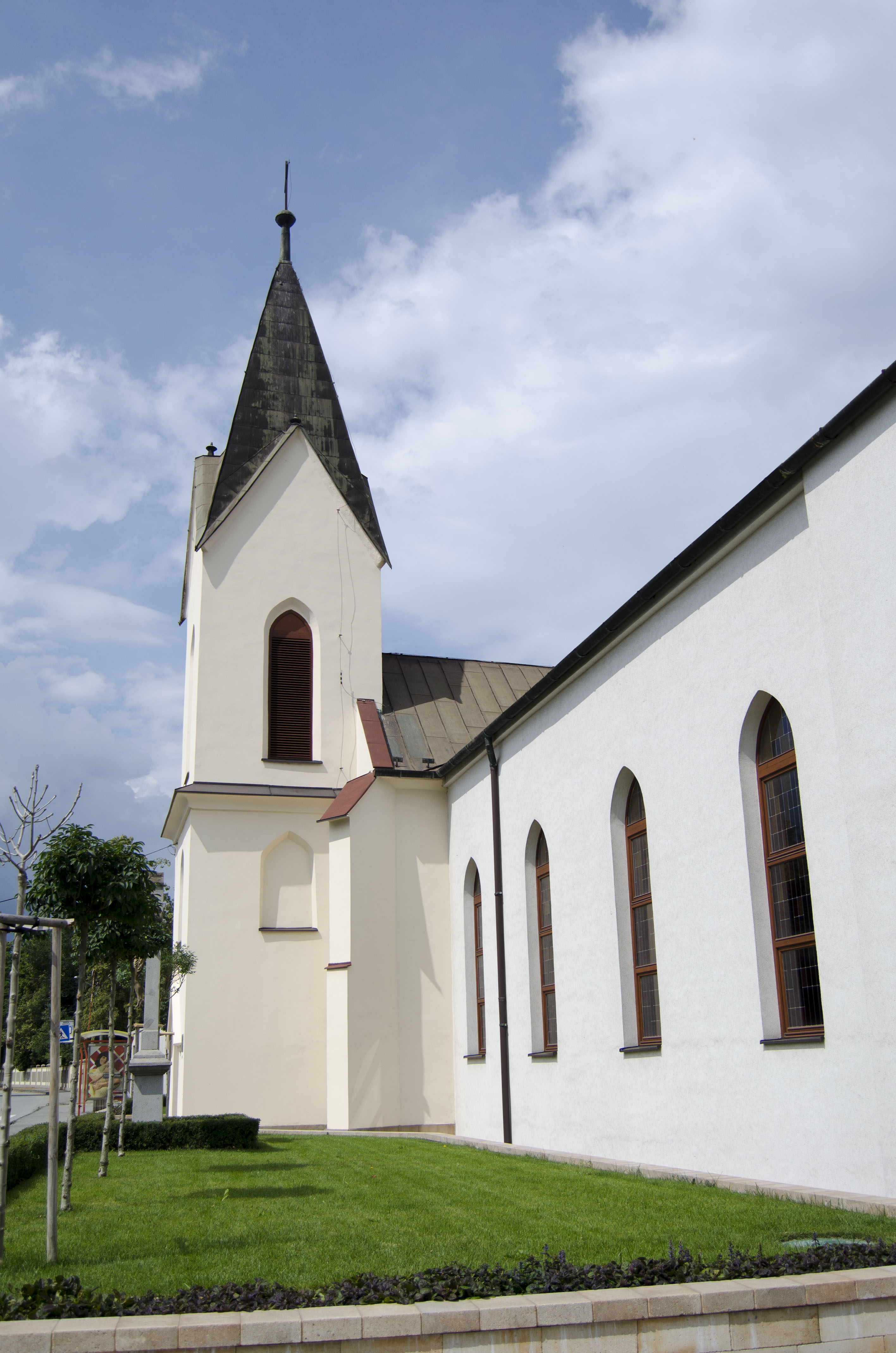 Kostol svätého Petra a Pavla v Barci- exteriér 2019